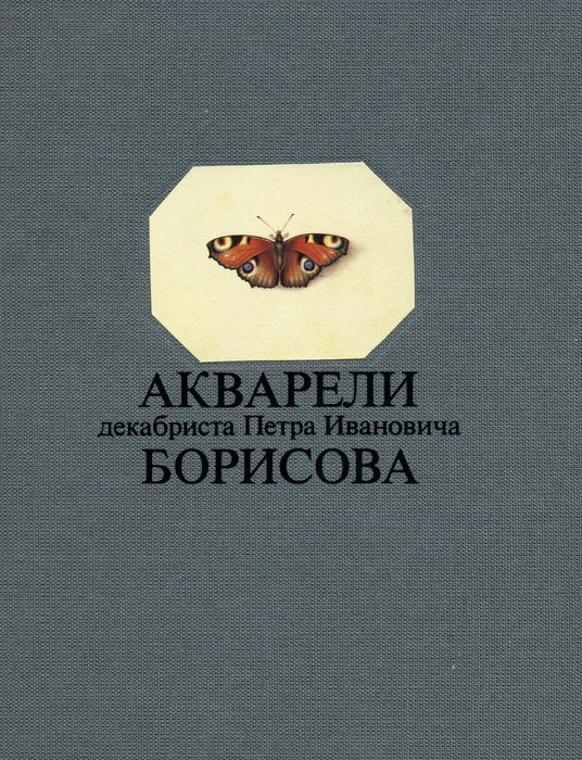 Обложка книги акварелей П. Борисова